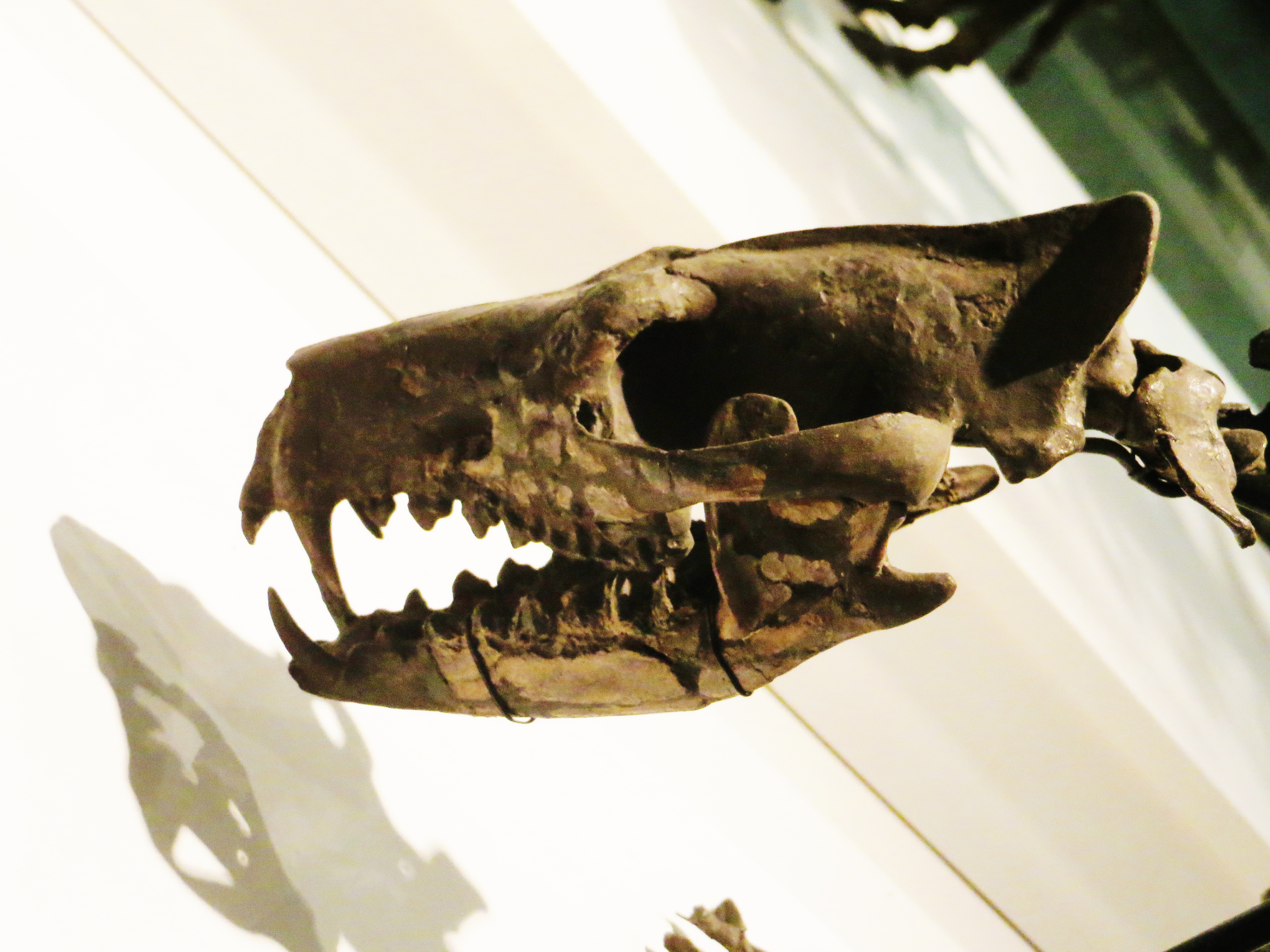 Took the picture at Senckenberg Museum, Frankfurt